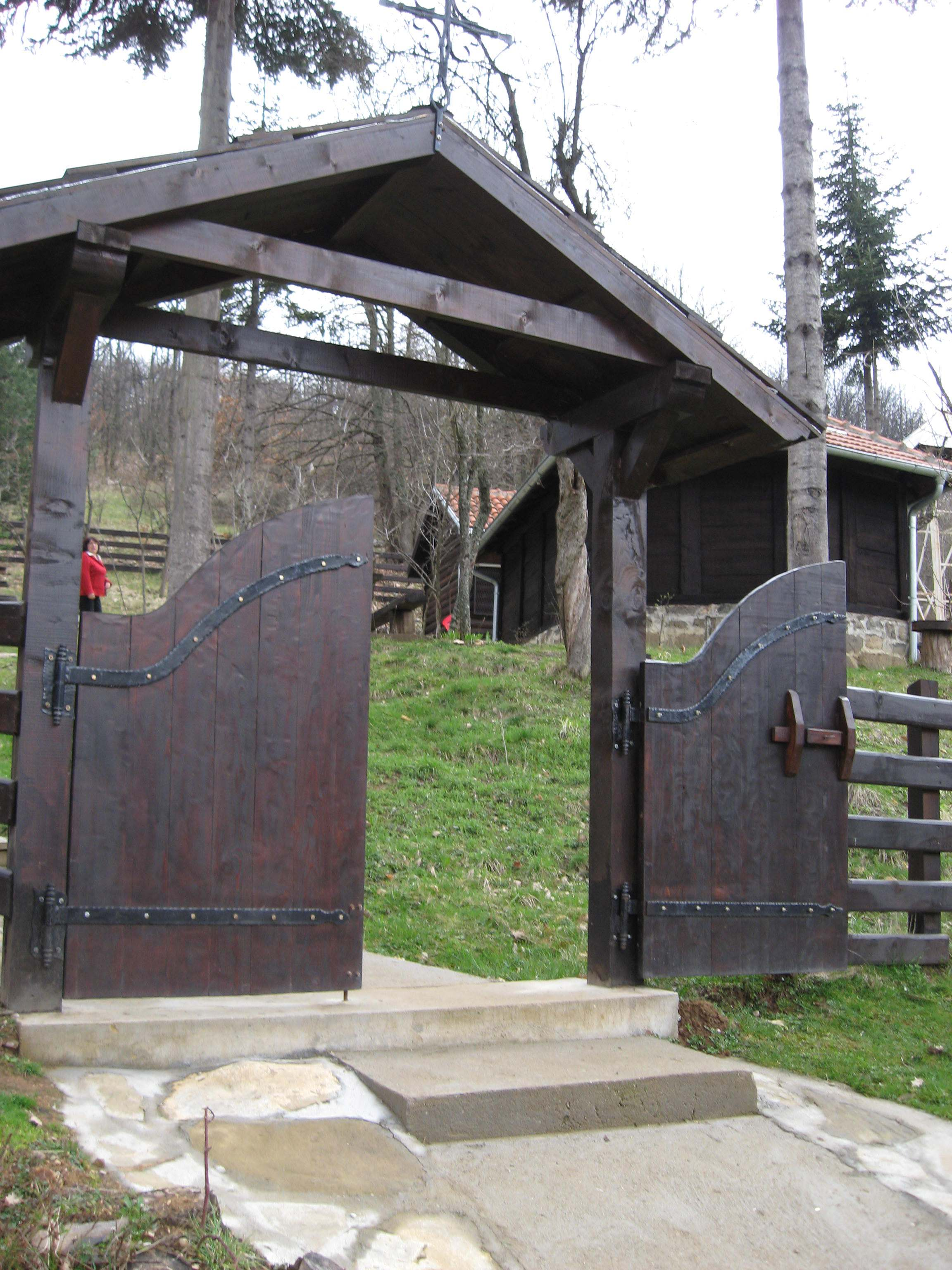 Dragan Cvetkovic, Niš. Kapija Crkva Lazarica.